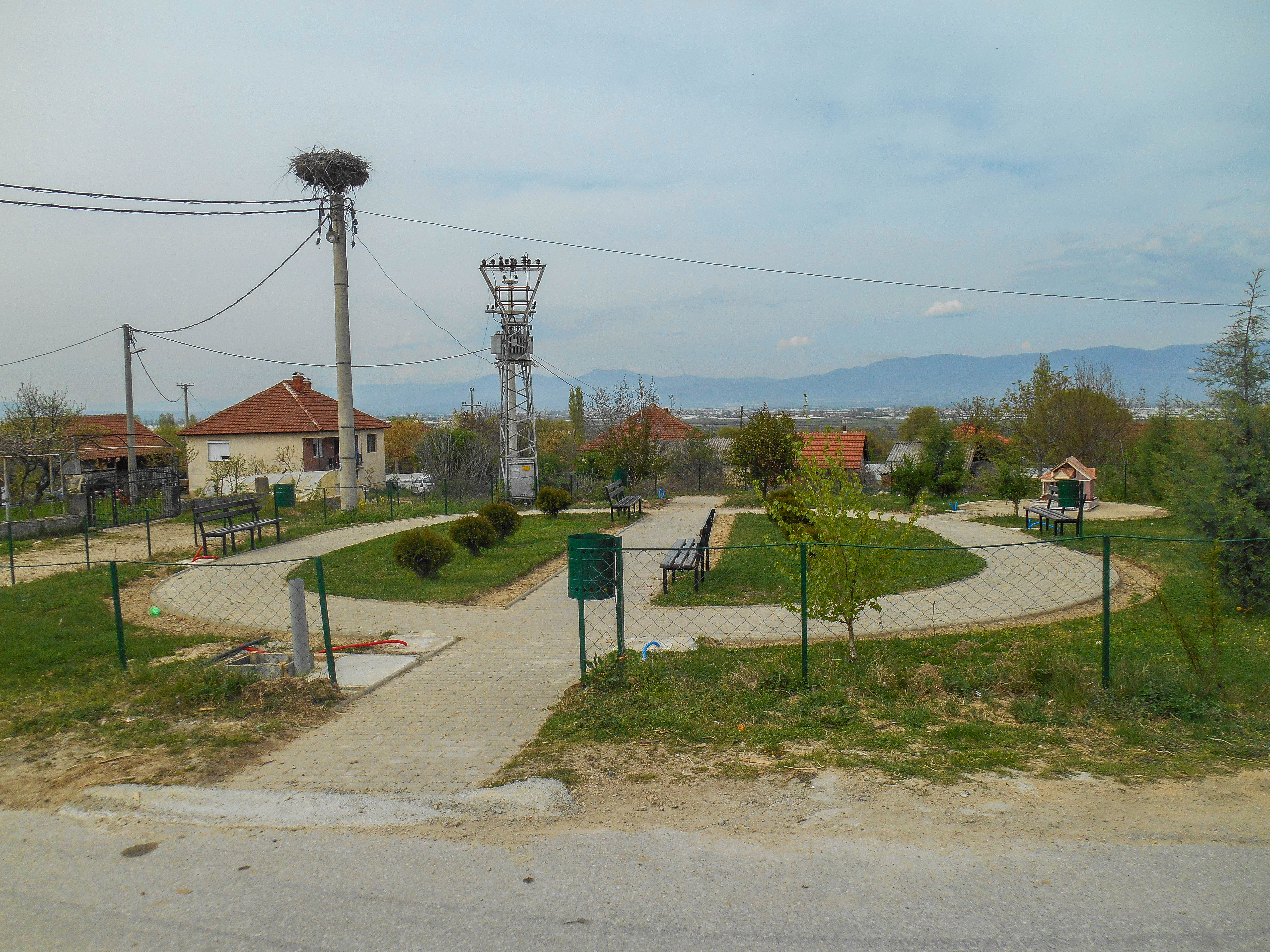 Свидовица